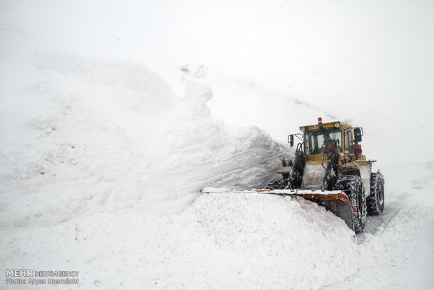 تلاش برای بازگشایی راه ها در کوهرنگ ۱۳۹۷